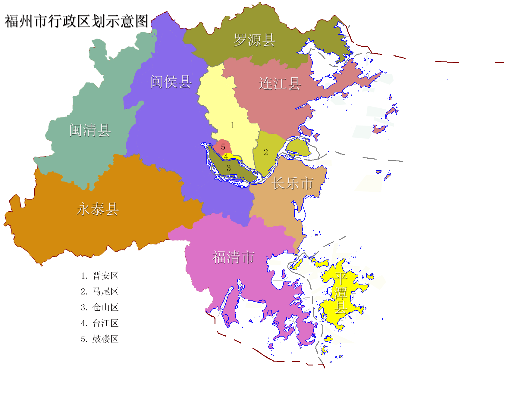 福州市行政区划图